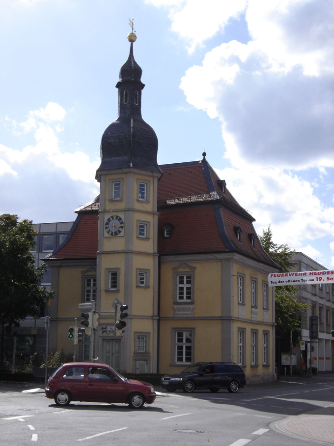 Altes Rathaus von Heddesheim